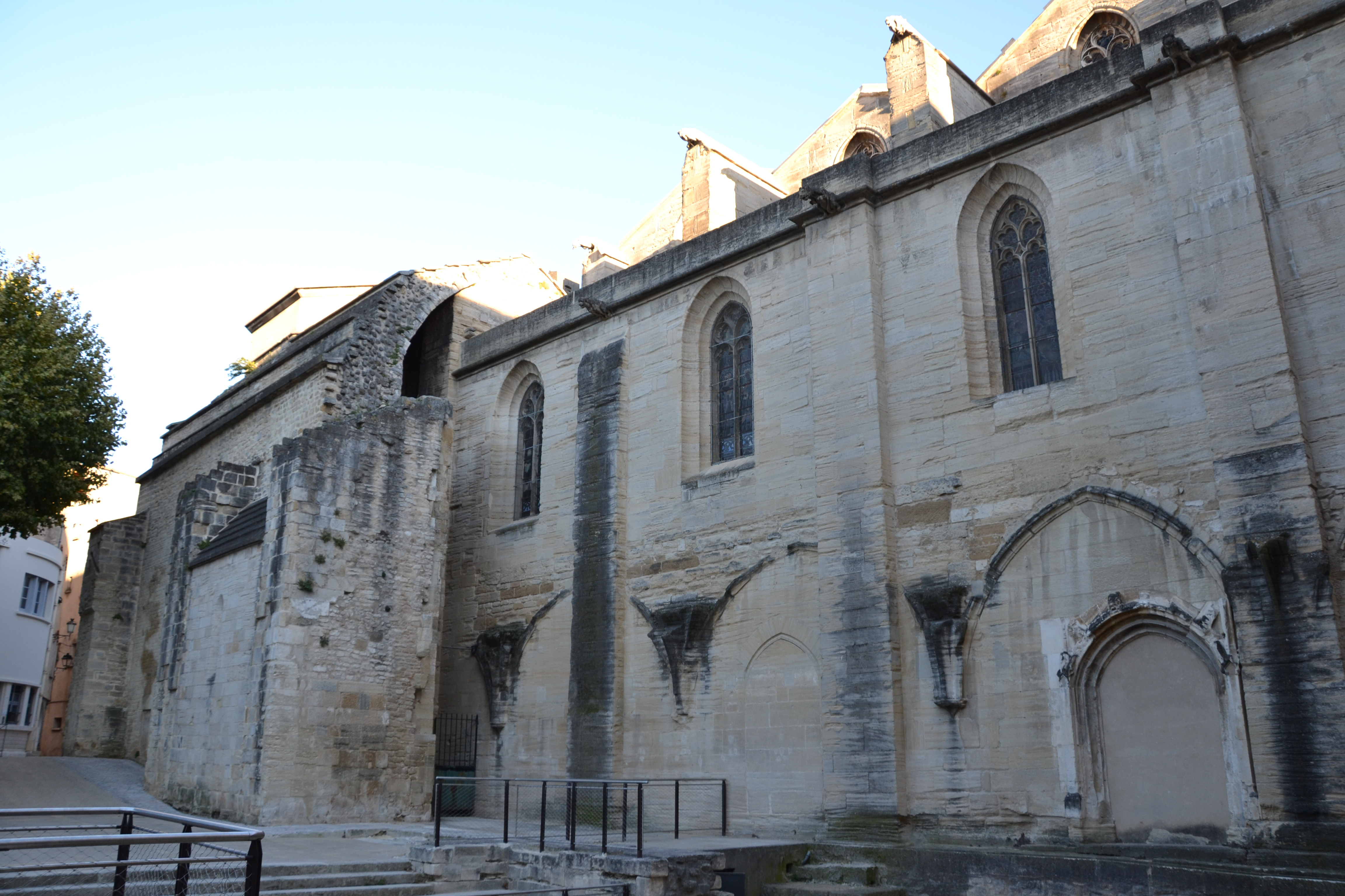 Église Saint-Siffrein de Carpentras, ou ancienne cathédraleéglise (classement) .